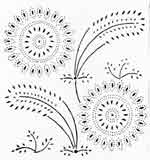 Міхась Філіповіч. Малюнак з альбома «Віцебская набіванка». 1920-я гады.